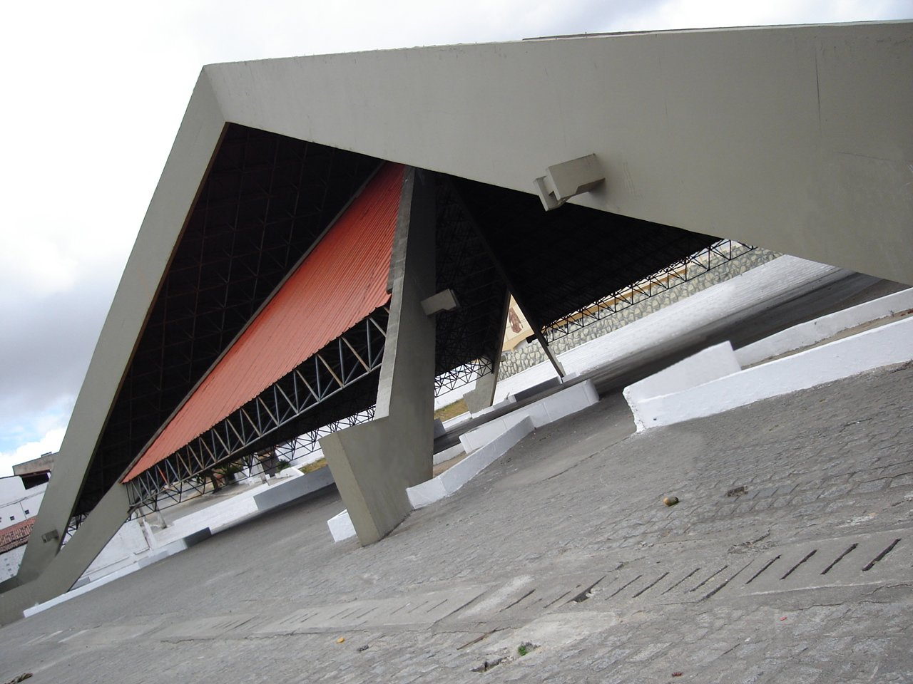 Pirâmide do Parque do Povo, Campina Grande - PB Ano: 2006. Author: Bruno Coitinho Araújo